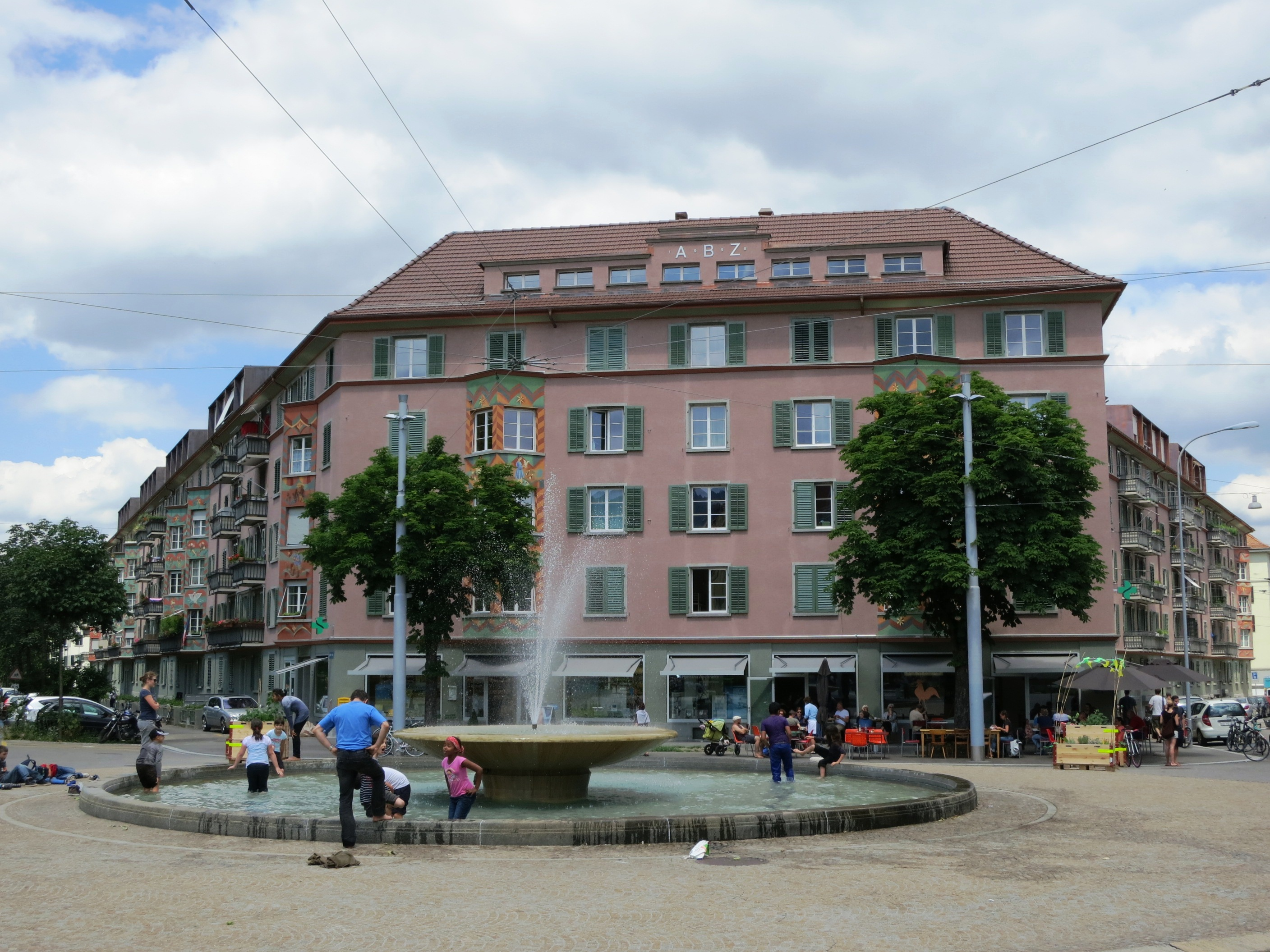 Wohnkolonie Sihlfeld, Zürich-Hard, Schweiz